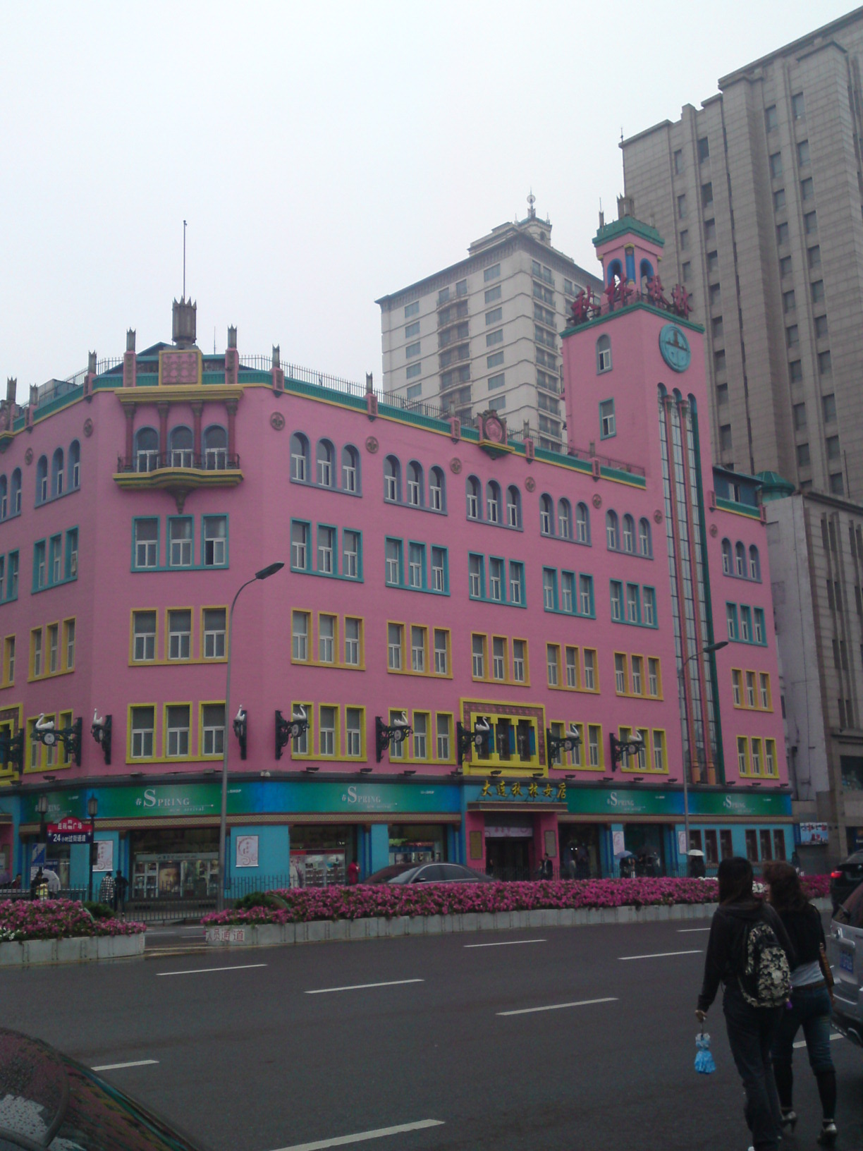 旧大連三越（現、秋林百貨店）